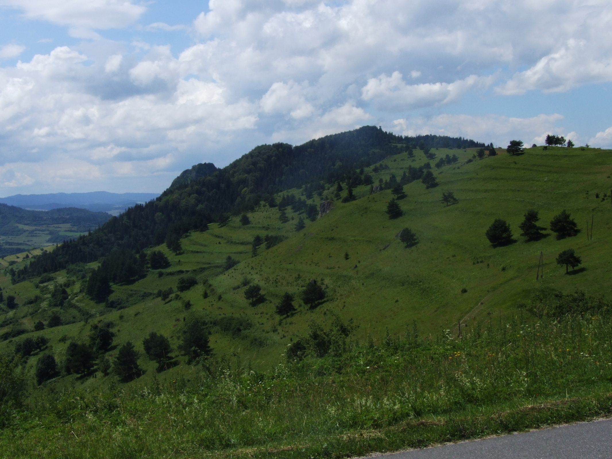 Grupa Golicy (Pieniny). Widok z drogi na przełęcz Tokarnia. Na pierwszym planie Aksamitka